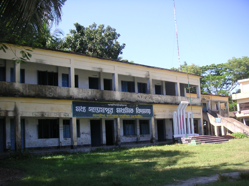 মধ্য সন্তোষপুর মাধ্যমিক বিদ্যালয় মূল ভবনের একটি চিত্র